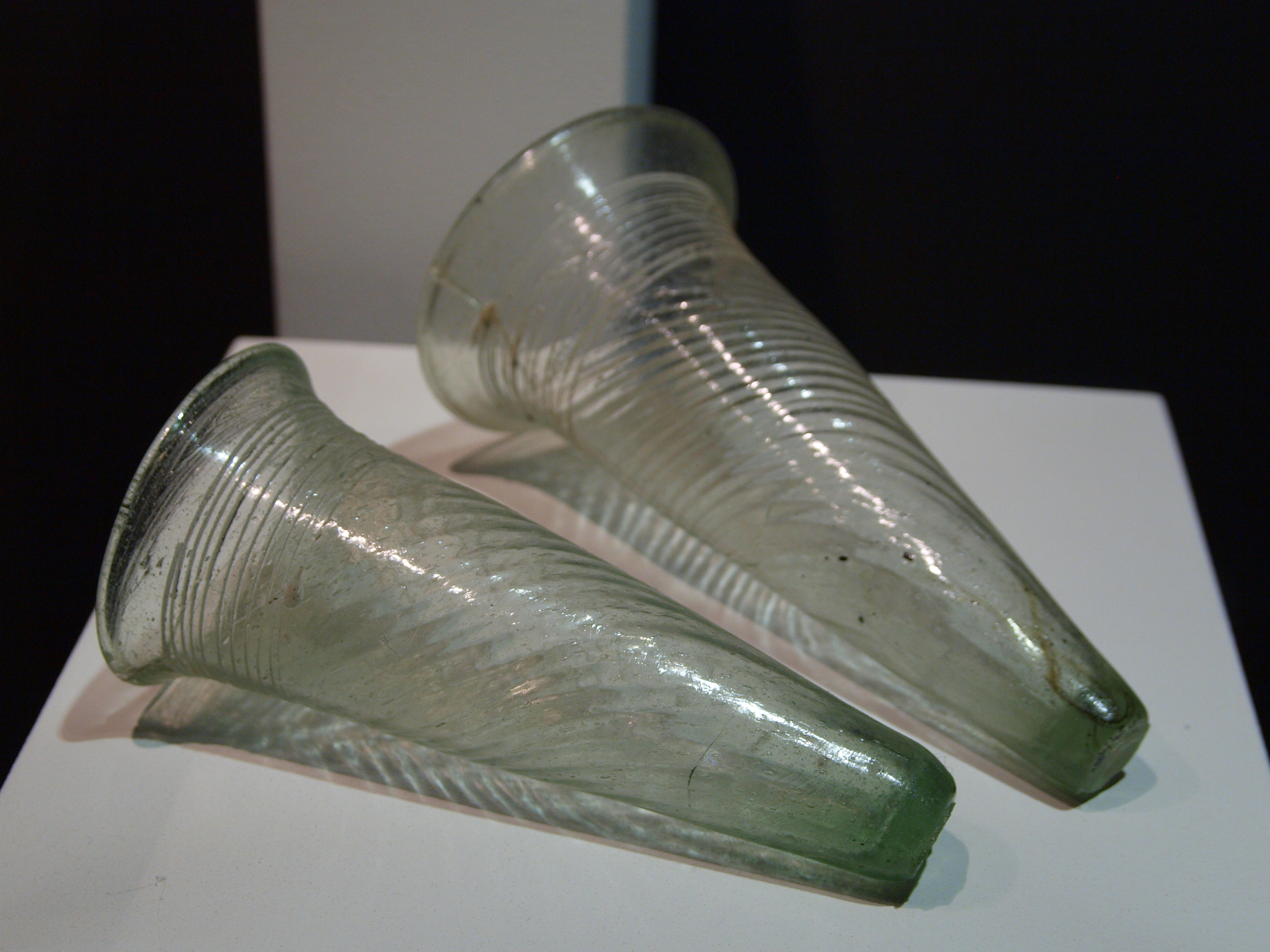 Zwei gläserne Sturzbecher aus dem bajuwarischen Gräberfeld von Straubing. Datierung etwa 6./7. Jahrhundert.